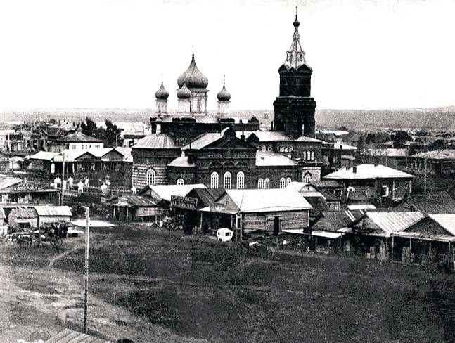 Верхнеуральск. Благовещенская церковь (пос. 1832) - открытка начала XX века.